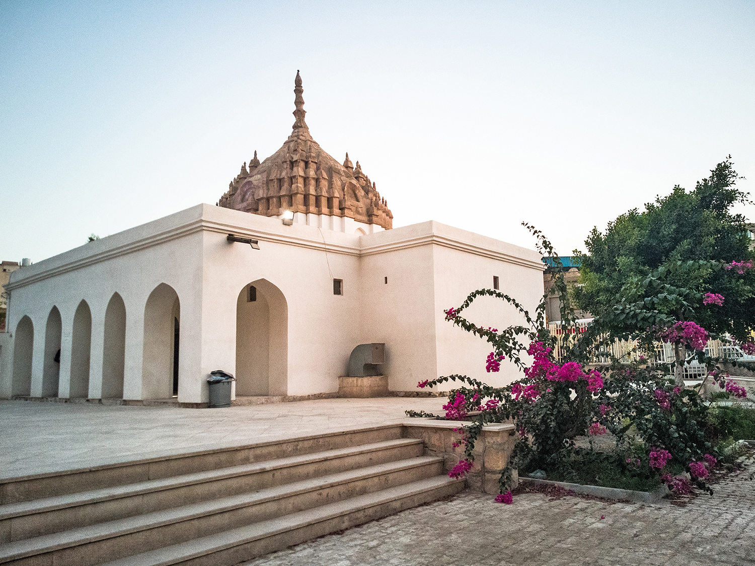 معبد هندوها بندرعباس